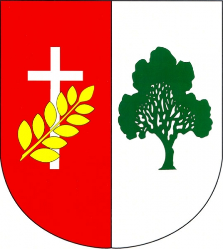 znak, Újezd, okres Žďár nad Sázavou